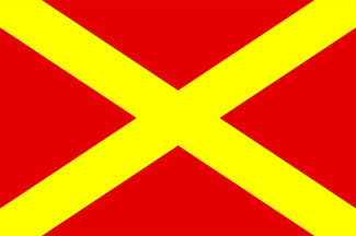 Bandera de O Incio, en Lugo (España)